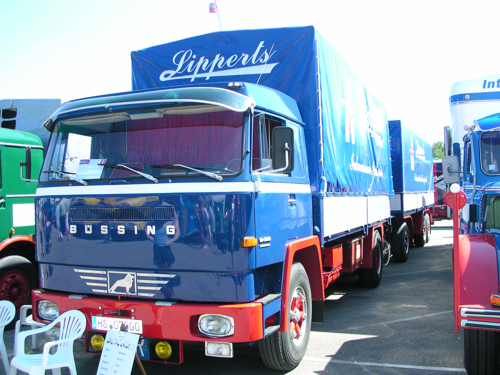 Wörth am Rhein, Oldtimer-Treffen bei Daimler-Chrysler Büssing BS 16 L, 235 kW (320 PS), Baujahr 1972